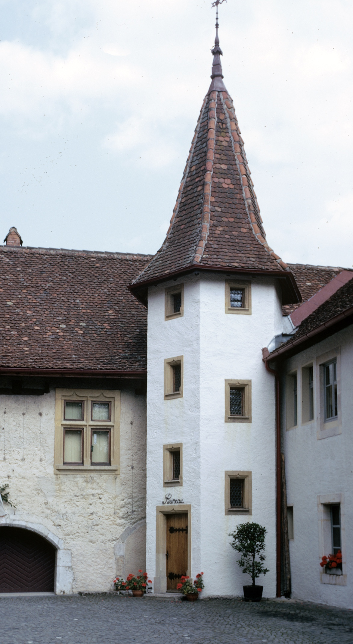 Tourelle d'escalier à l'intérieur de la cour